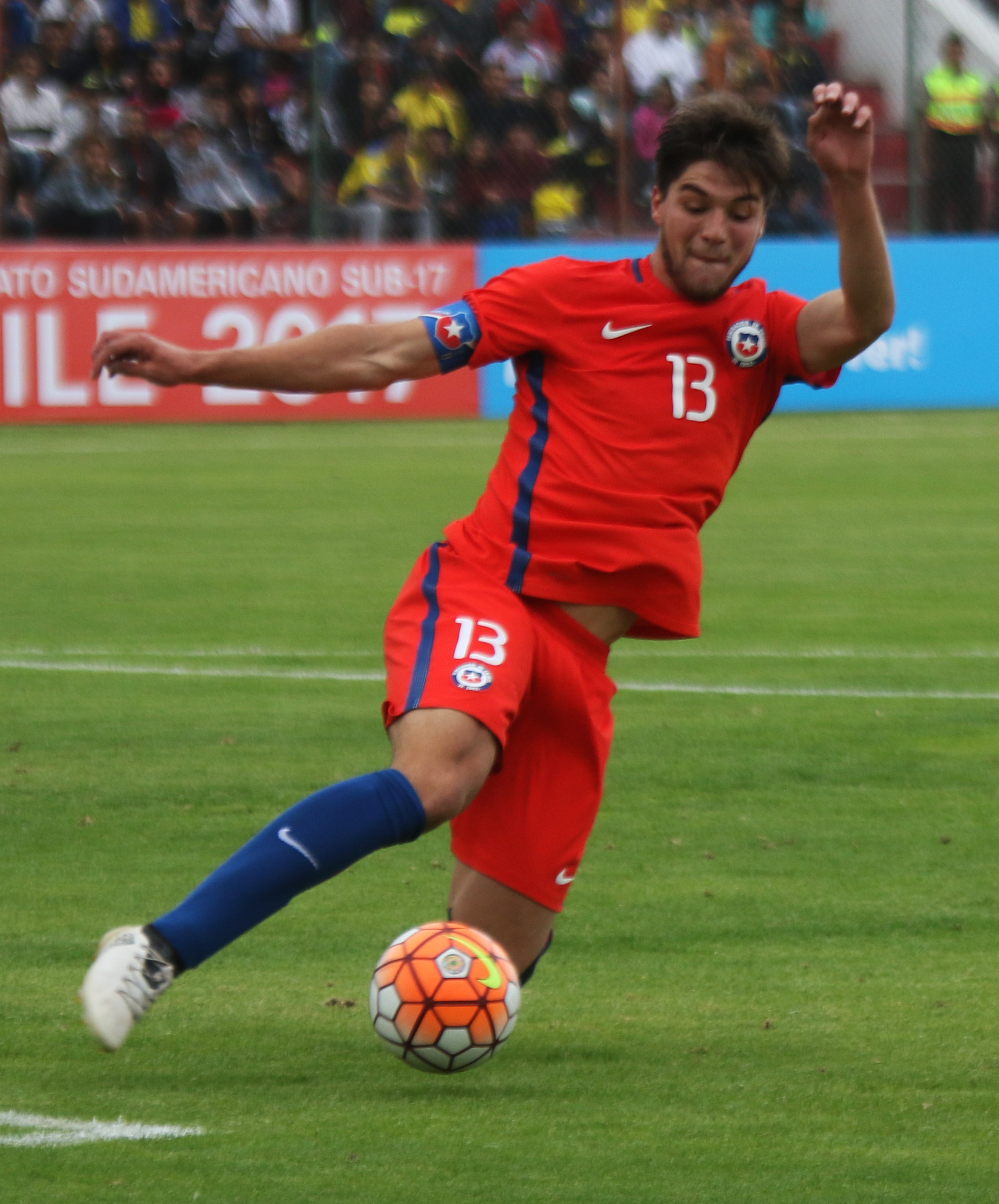 Ambato, Ecuador, 22 enero 2017 (Andes).- Ecuador igualó 1-1 este domingo con Chile en la ciudad de Ambato y dejó vivas las posibilidades de clasificar a la fase final del Campeonato Sudamericano Sub 20 del que es anfitrión, y se alista desde ya para jugar con Paraguay en la última jornada, el jueves próximo, en la ciudad ecuatoriana de Ríobamba. ANDES/Micaela Ayala V.